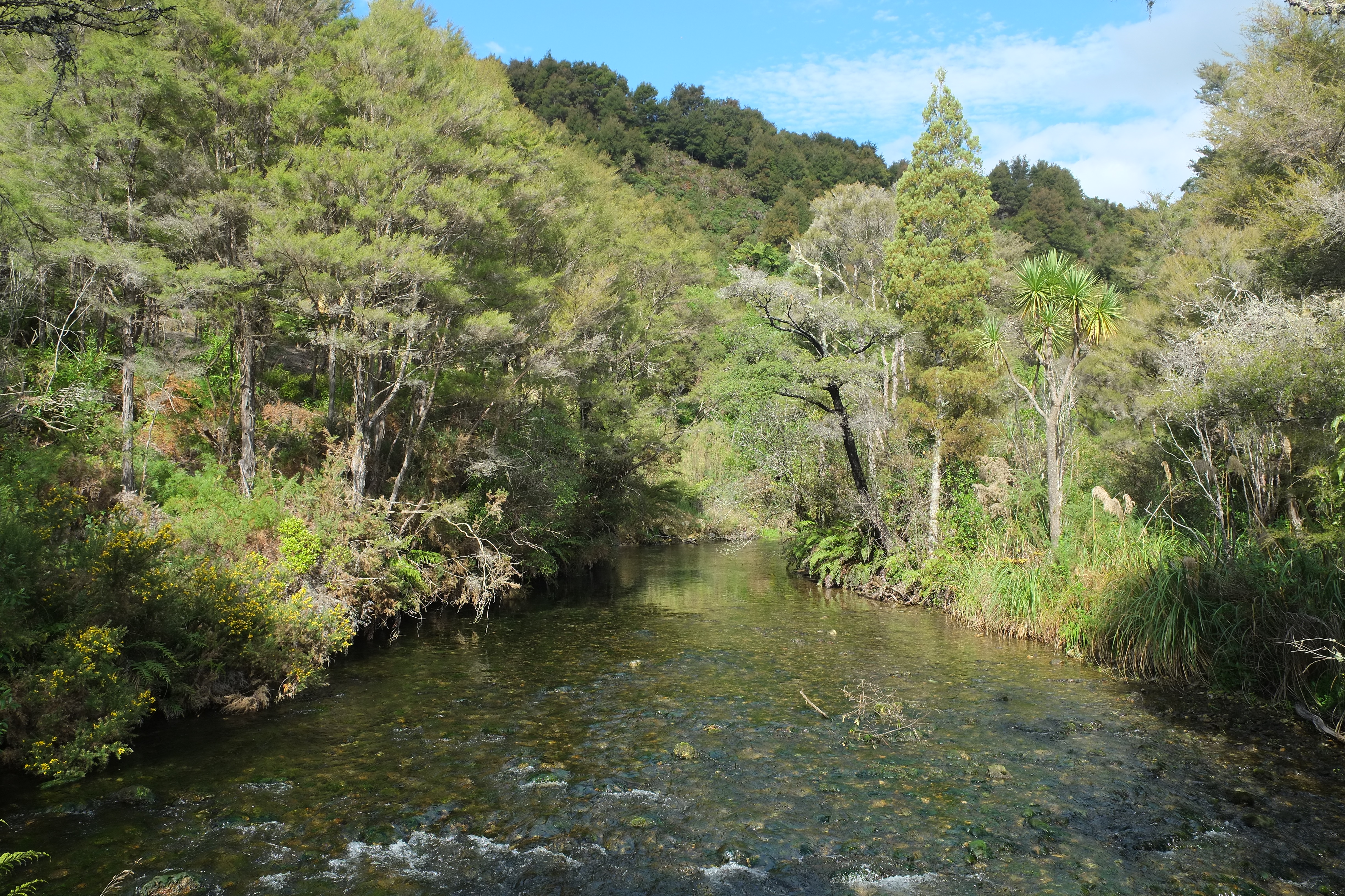 Waikoropupu River near Te Waikoropupū Springs